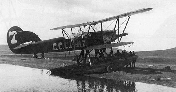 Р-5a (МР-5), разведывательный гидросамолет с двумя поплавками.